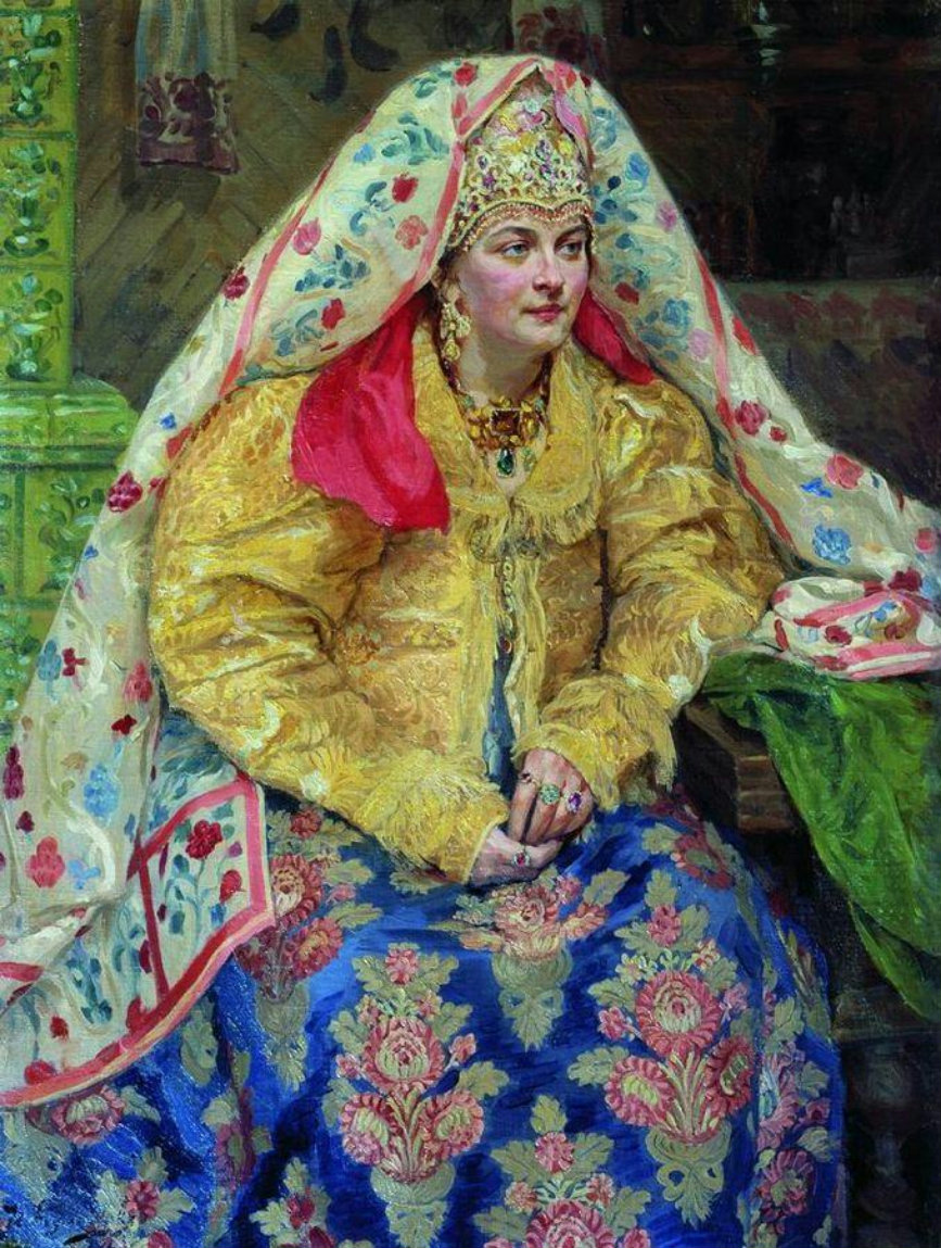 Куликов И.С. В русском наряде, 1916 (портрет жены Е.А.Куликовой) State Museum of History and Art, Murom